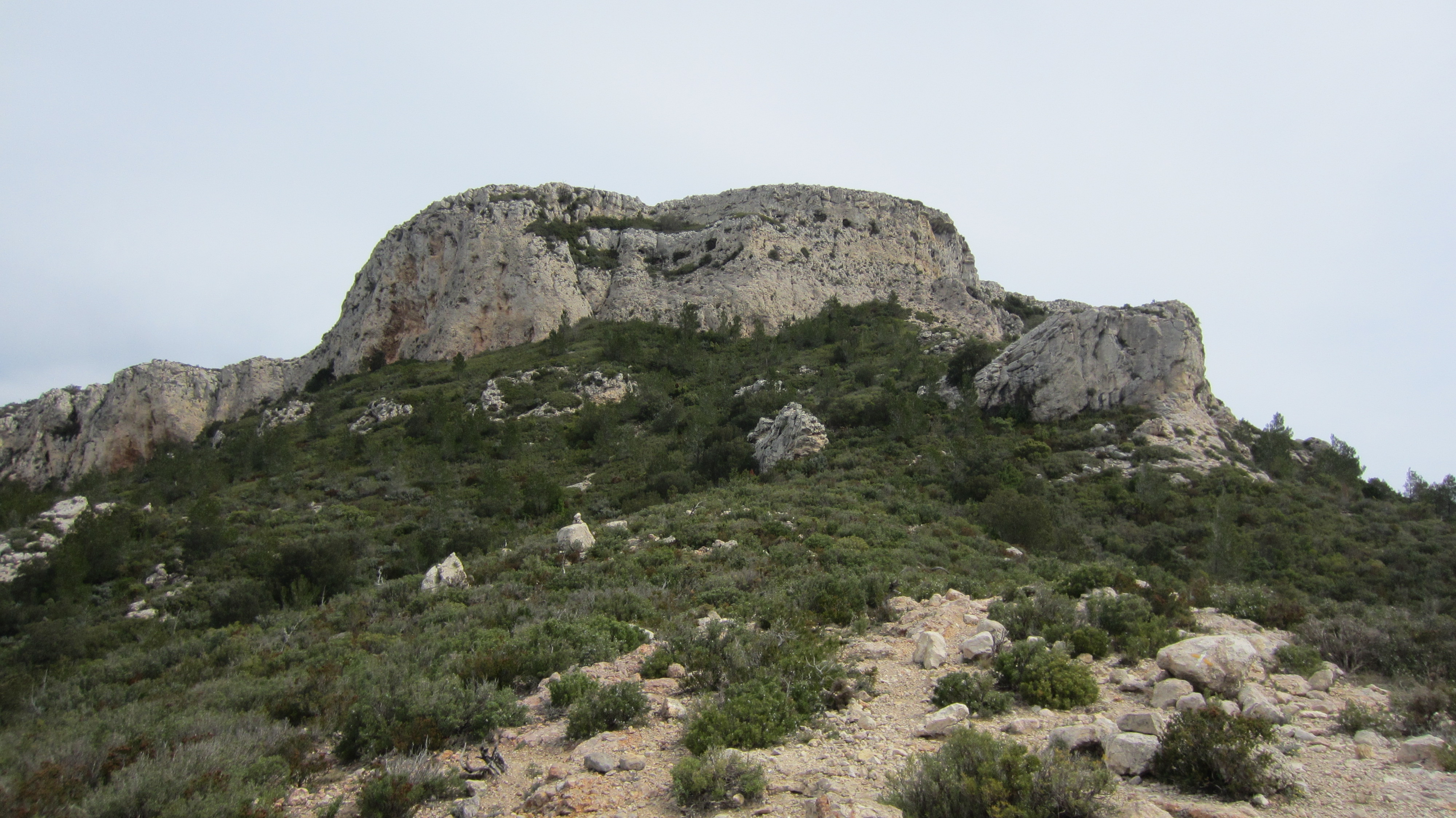 Moleta de Genessies des del Coll del Rourar